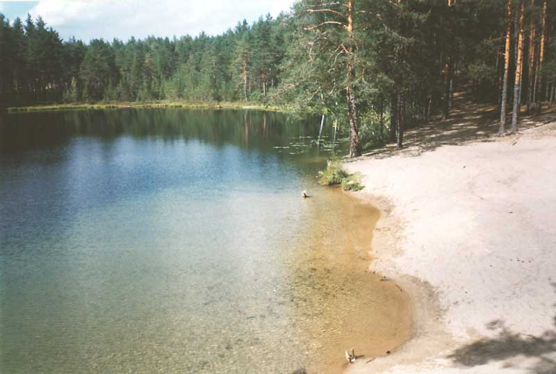 A lake on Karelian Isthmus, 1999